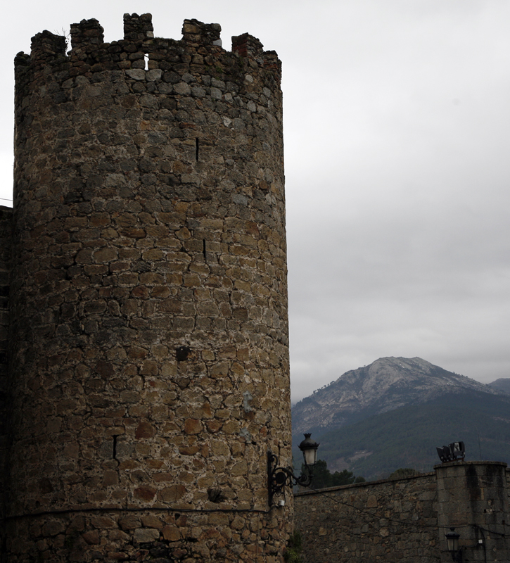 Arenas de San Pedro Castle